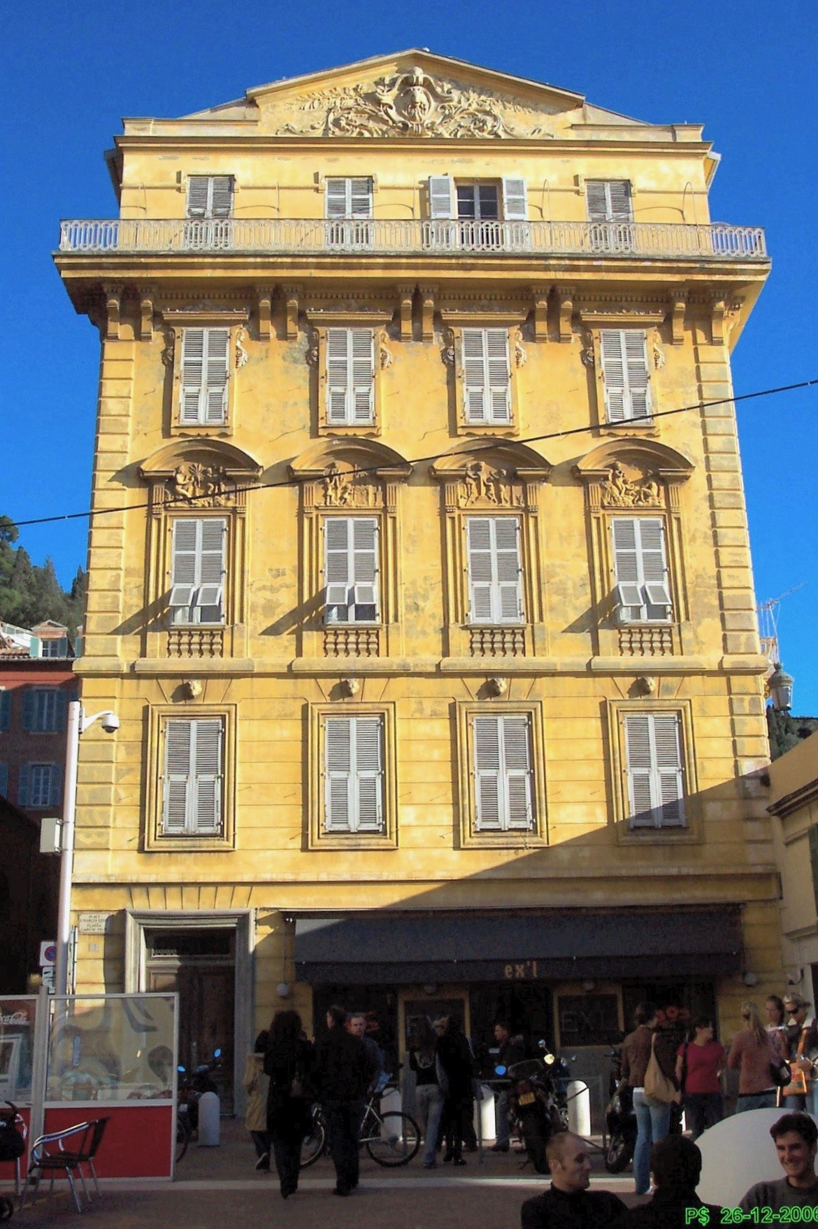 Palais Caïs de Pierlas, cours Saleya-Place Charles Felix Vue en après-midi. Au fond, la colline du château.